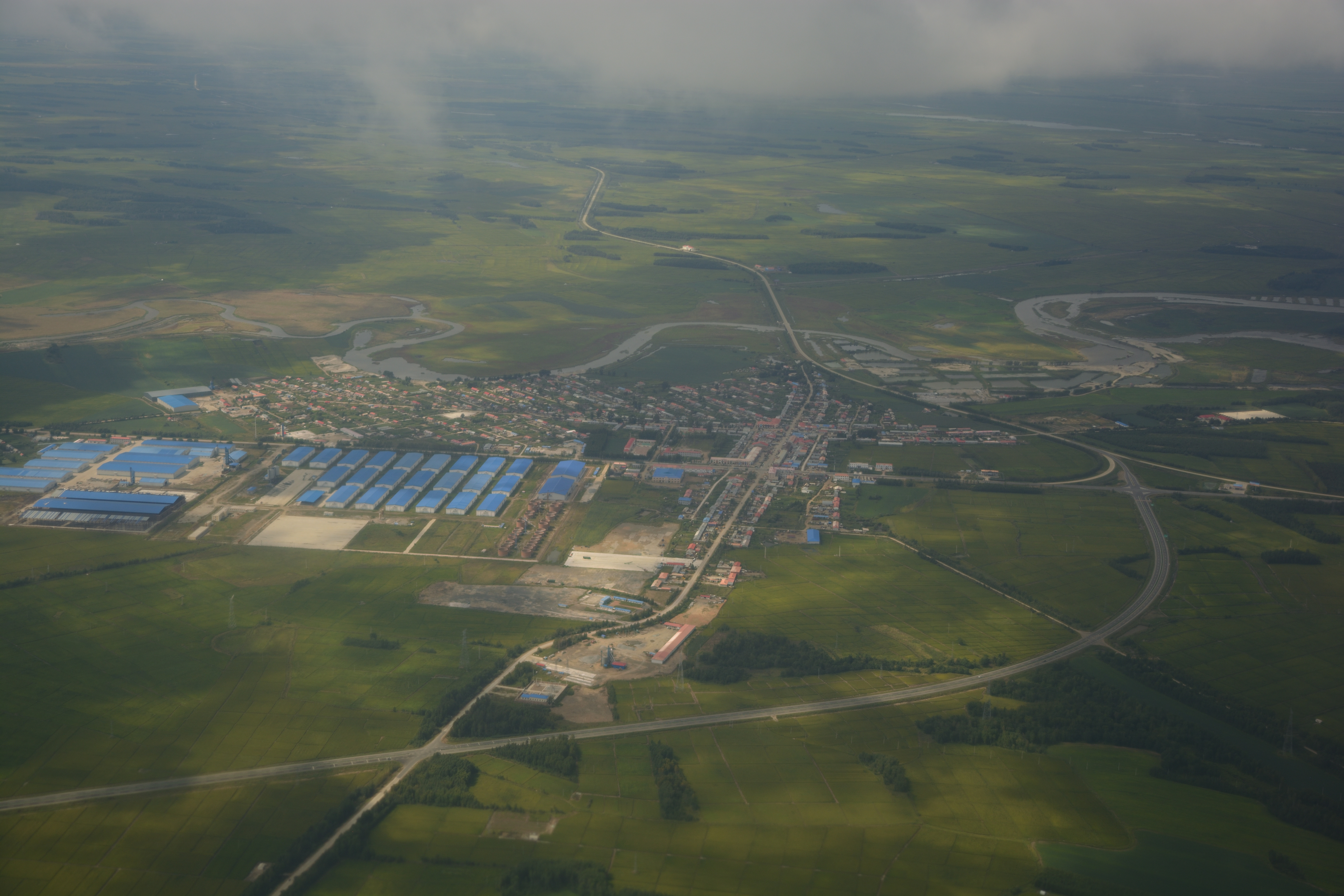 中文（中国大陆）: 中华人民共和国黑龙江省佳木斯市抚远市浓桥镇